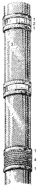 Схема крепления составной деревянной мачты парусных судов